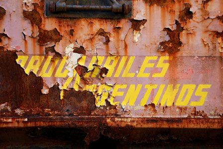 Restos de pintura y logo de Ferrocarriles Argentinos en el lateral de una locomotora radiada y abandonada en los talleres ferroviarios de San Cristóbal, provincia de Santa Fe